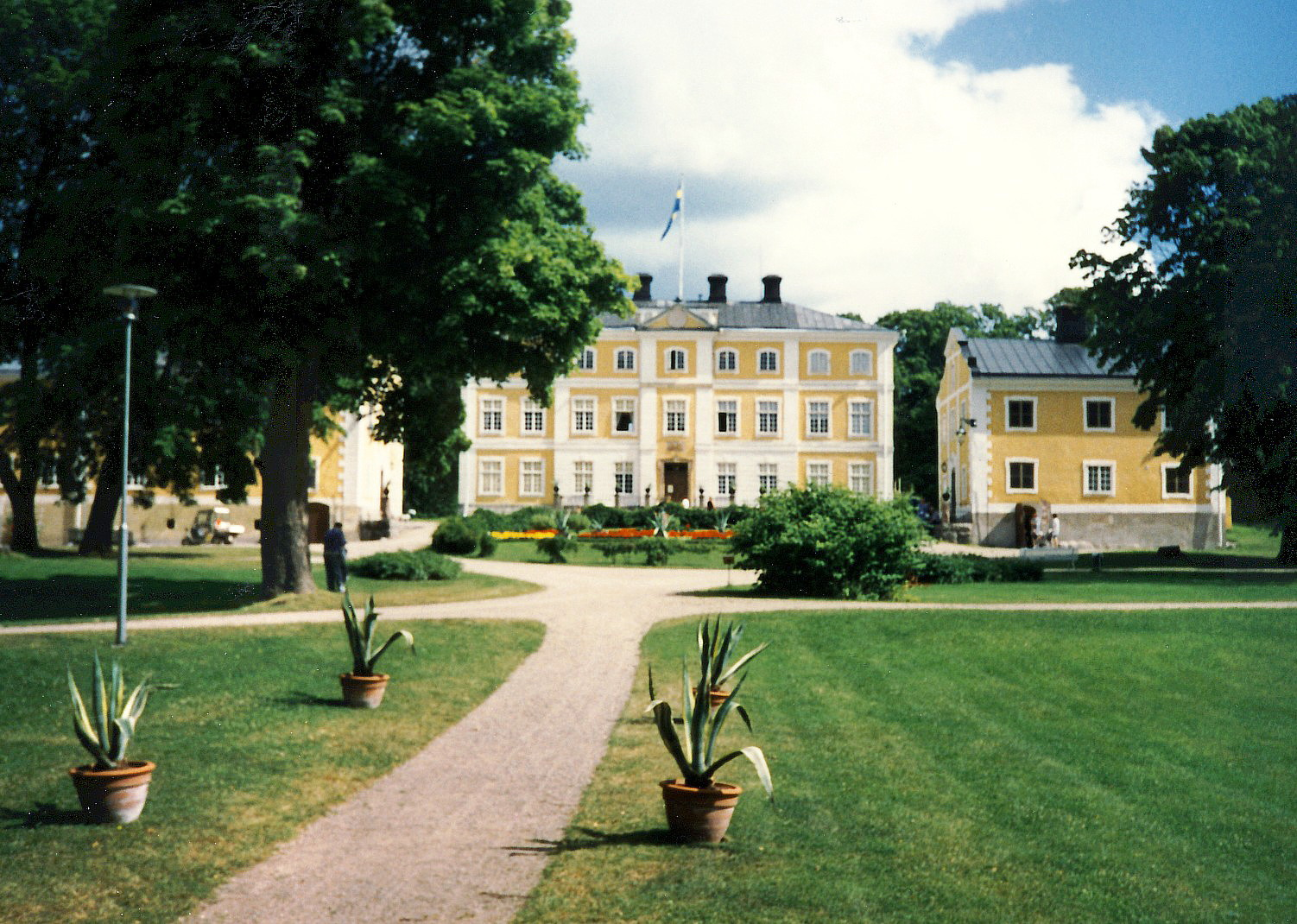 Julita herrgård i Katrineholms Kommun